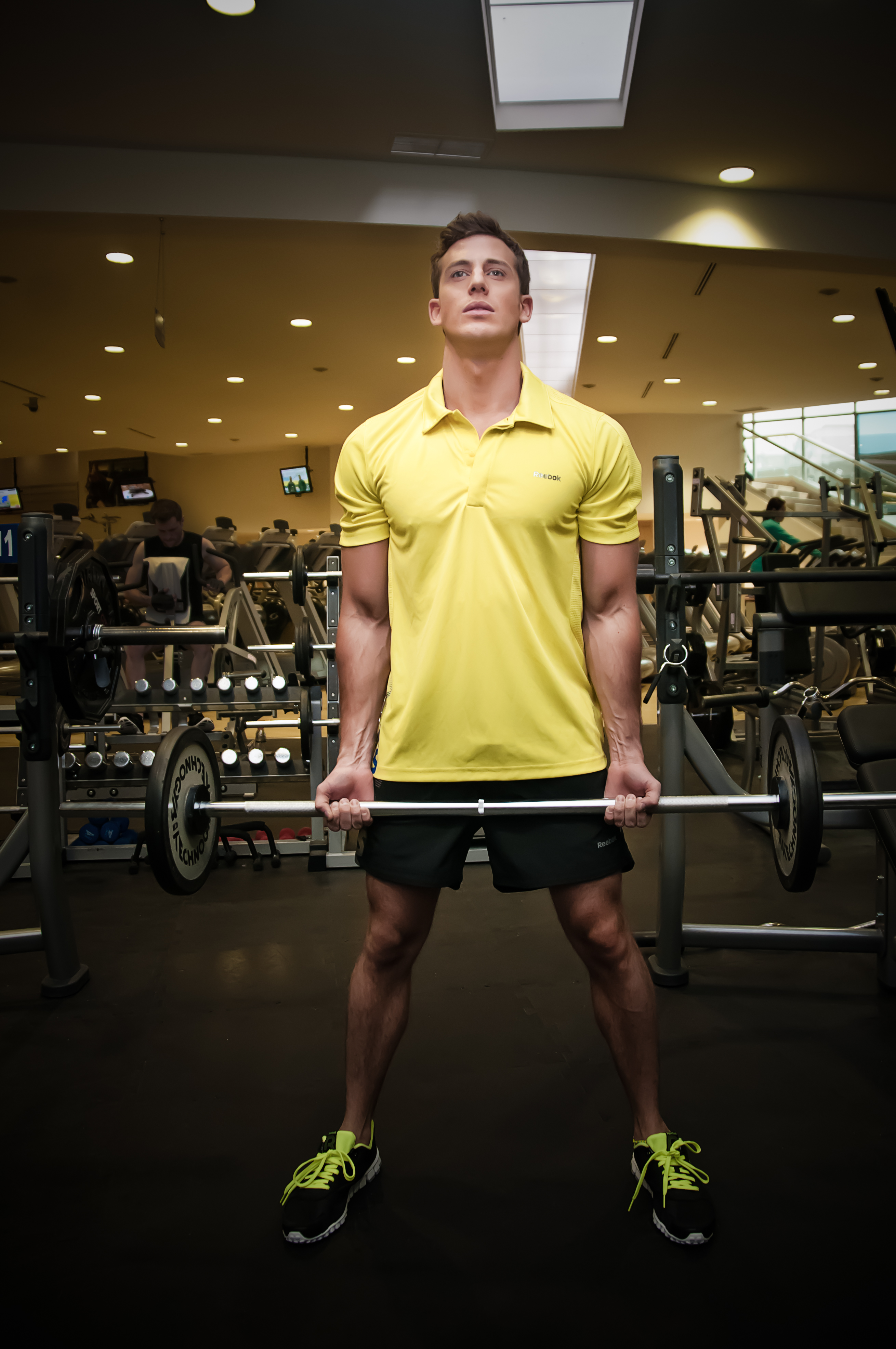 y disciplina. En ropa deportiva de marca comercial conocida. En gimnasio de prestigio